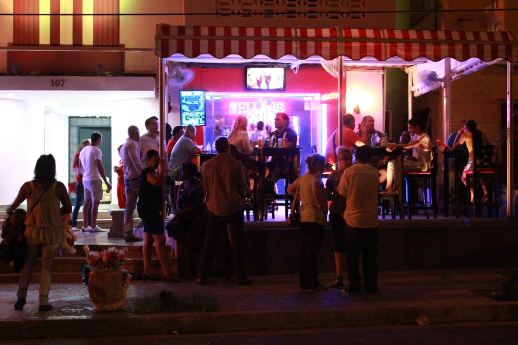 Las afueras del 3DCafe el frente